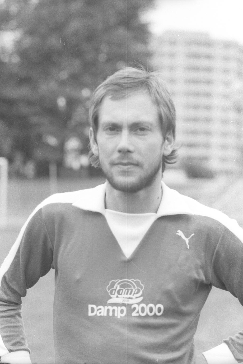 Fußballspieler von Holstein Kiel in der Saison 1978/79.